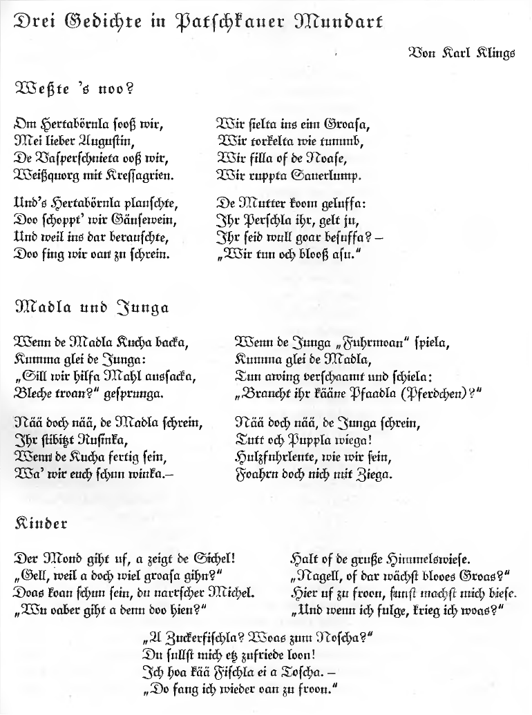 Drei Gedichte in Patschkauer Mundart (Schlesische Sprache).